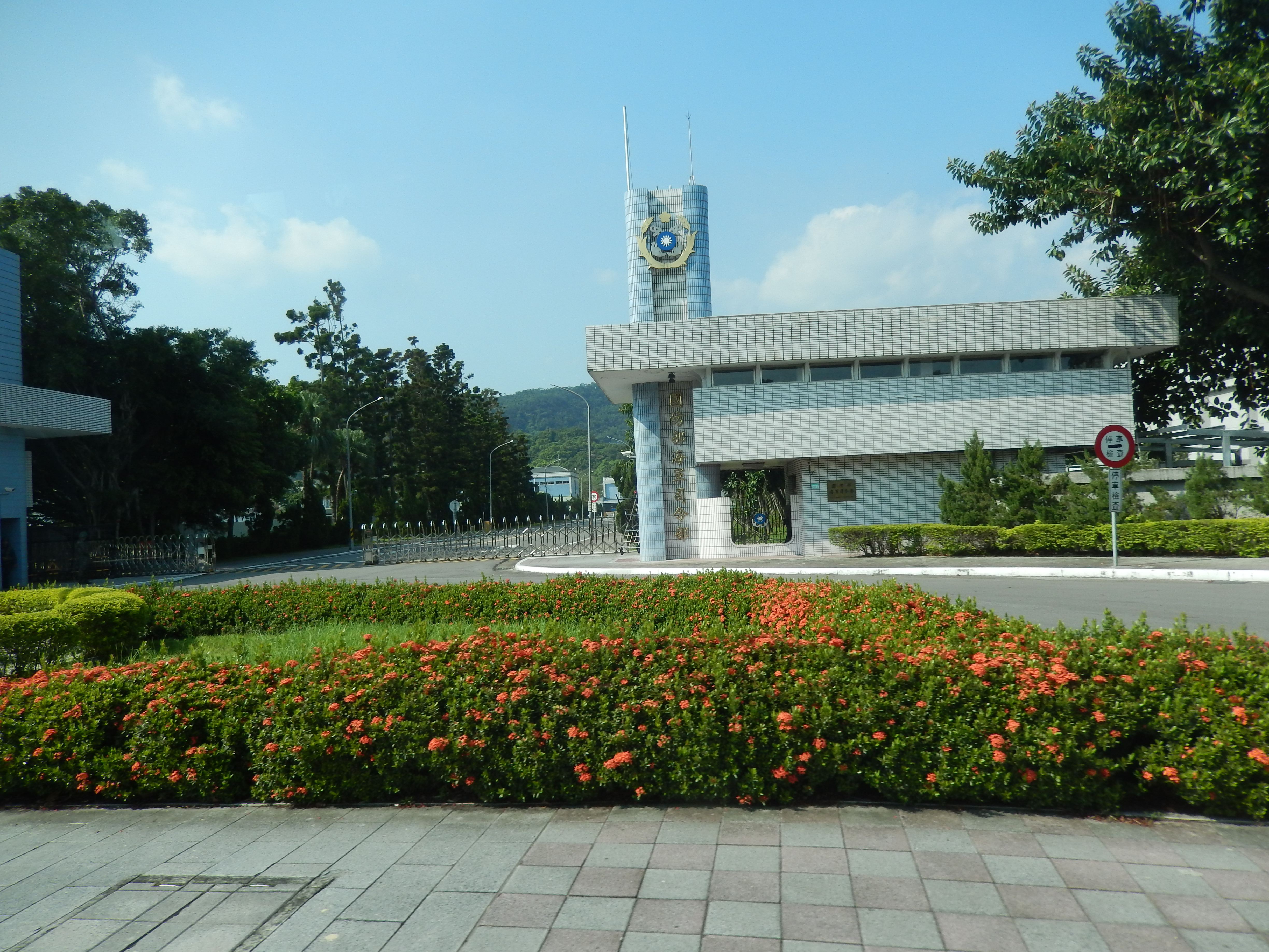 中華民国国防部海軍司令部